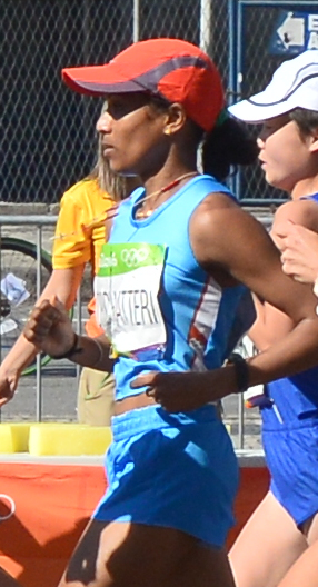 Passage du marathon des jeux olympiques de Rio 2016 dans le centre de Rio